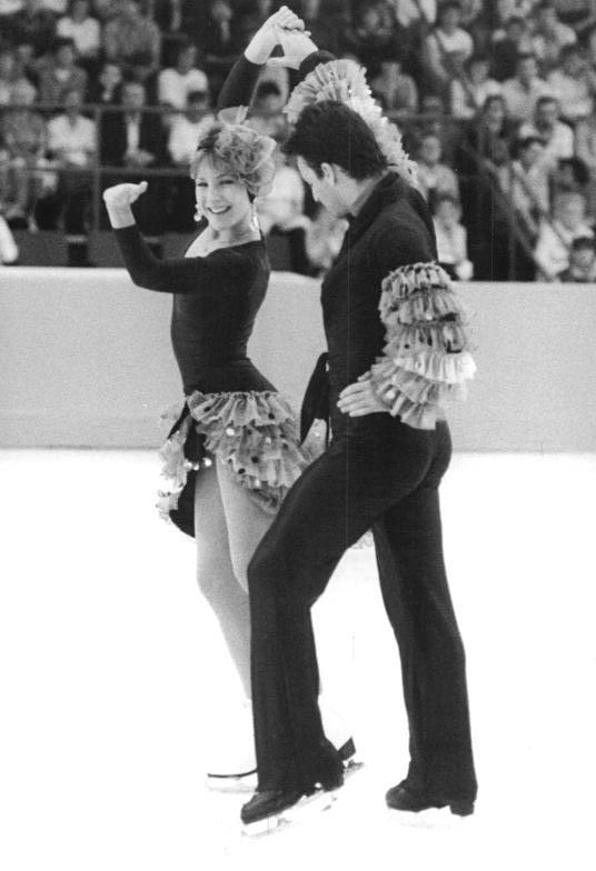 Tracy Wilson, Robert McCall ADN-ZB Schindler 12.7.85 Berlin: ISU-Sommerschaulauf-Tournee- Den besonderen Beifall in der ausverkauften Berliner Dynamo-Eishalle forderten am 11.7.85 Tracy Wilson - Robert McCall (Kanada), die Vierten der Weltmeisterschaft im Eistanz, mit einer Break-Dance-Parodie heraus. Die traditionelle ISU-Sommerschaulauf-Tournee durch die DDR und die Schweiz, mit Eiskunstläufern aus Kanada, der BRD, Frankreich, der Schweiz und der DDR, wird am 13. in Dresden und am 14.7.85 in Karl-Marx-Stadt fortgesetzt.